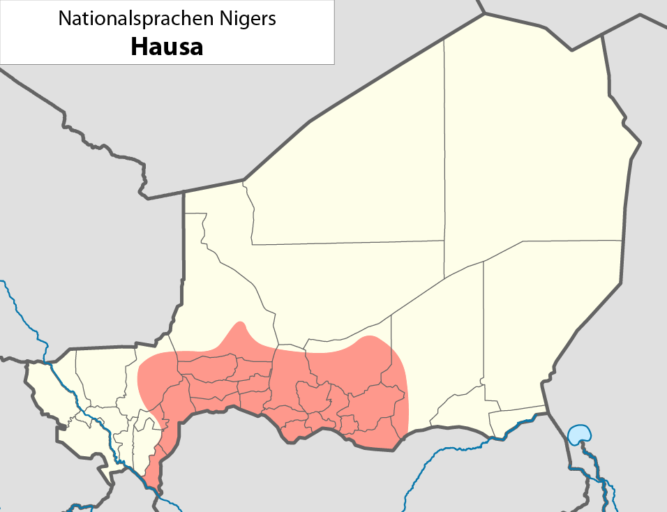 Nationalsprachen des NigerDie dargestellte Nationalsprache kann dem Dateinamen entnommen werden.